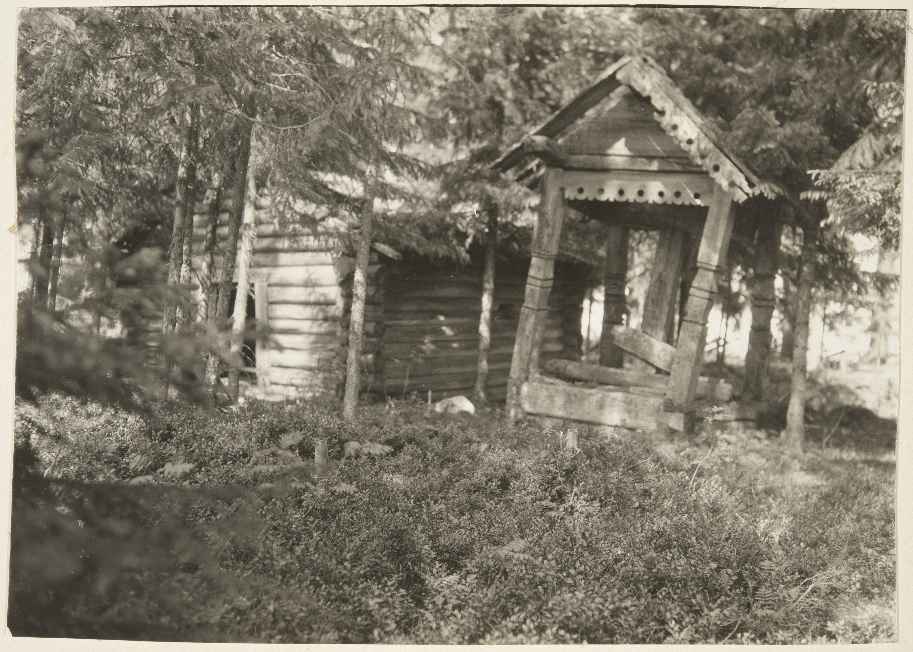 Ägläjärven vanha tsasouna ja vieressä koristeellinen ristin katos.